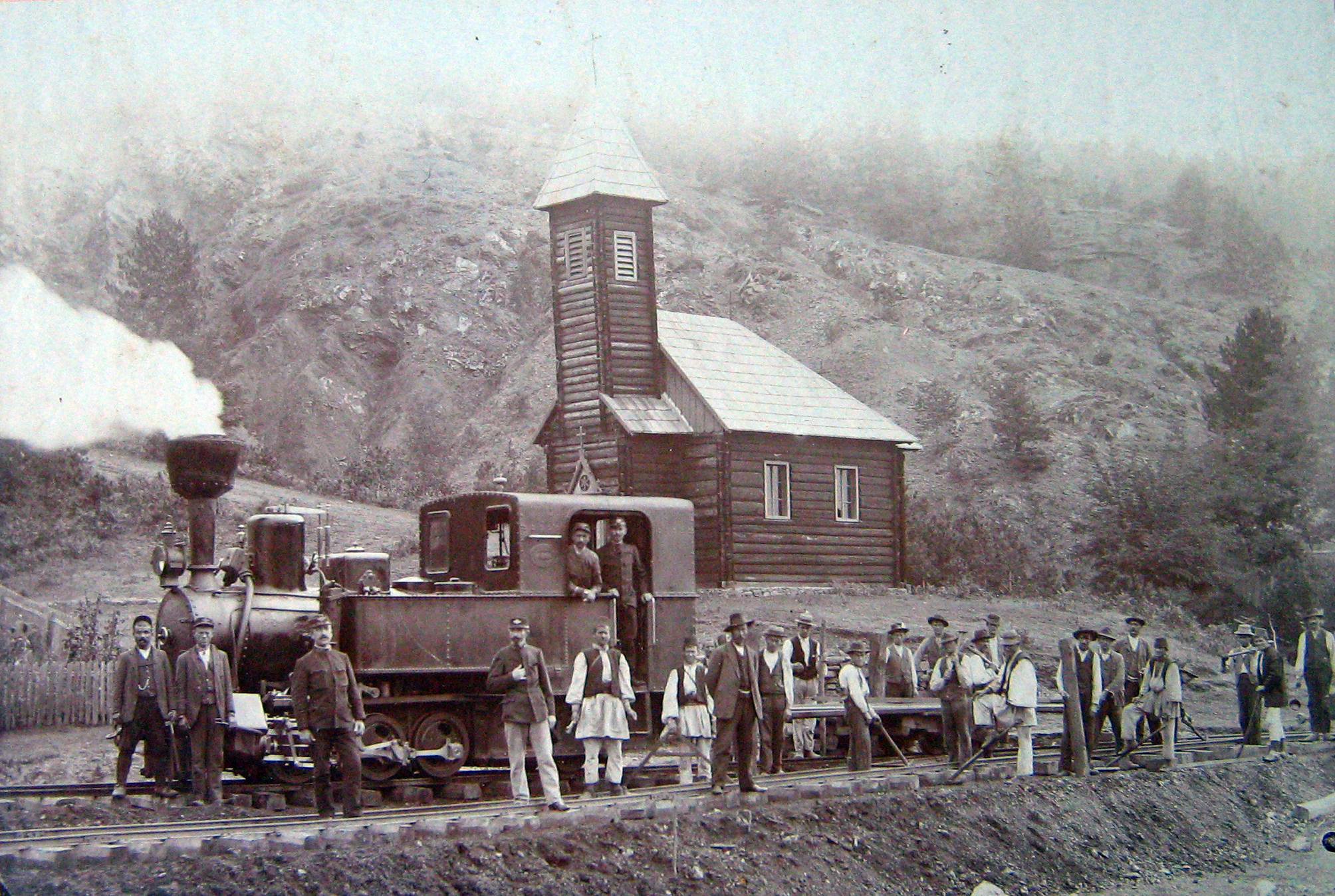 Фотографија направљена пре више од 100 година. Из личне архиве. Датотека добијена поновним фотографисањем.